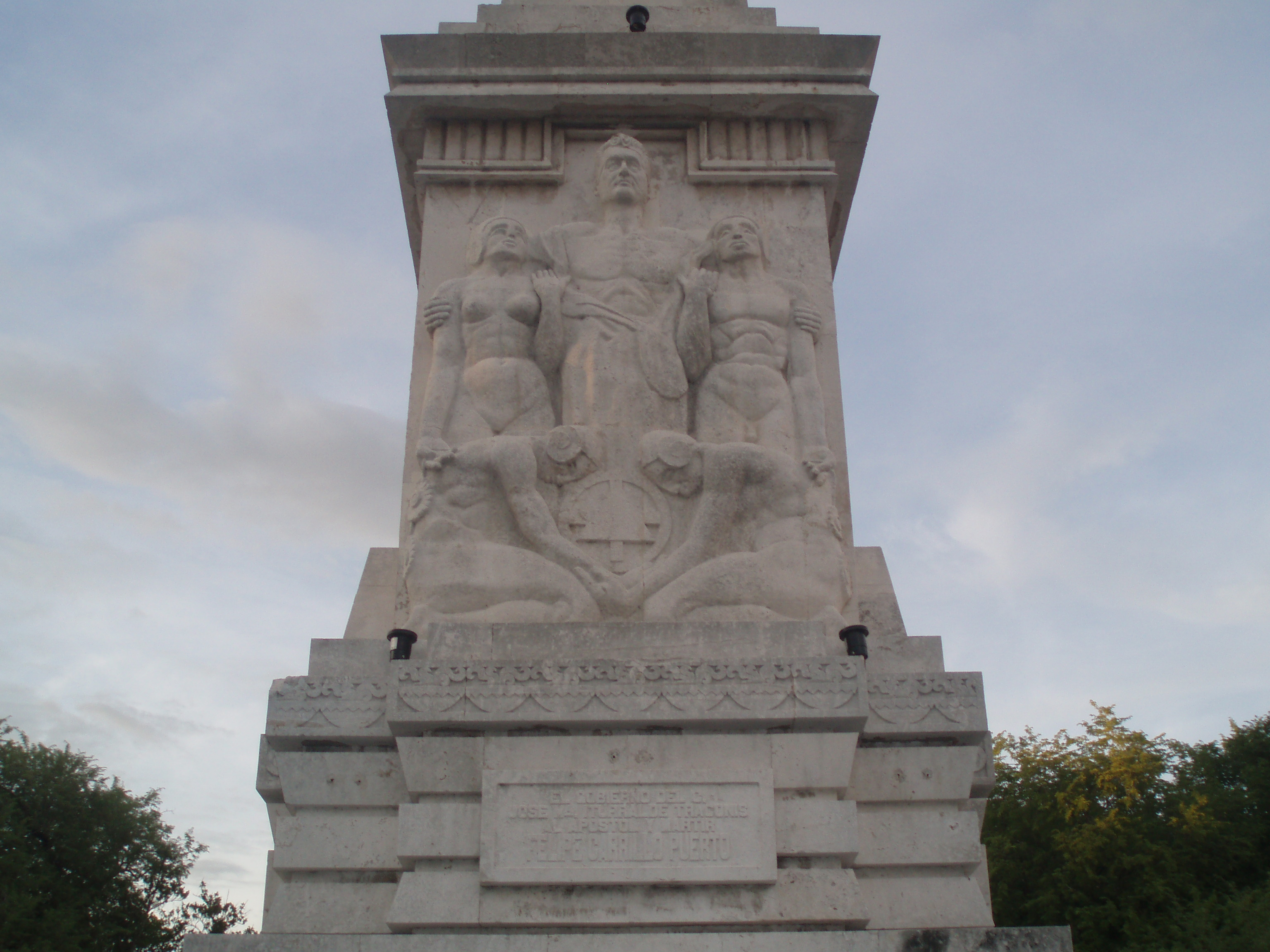 Monumento a Felipe Carrillo Puerto en Paseo de Montejo. Se lee la leyenda: EL GOBERNADOR DEL C. JOSE MA. ITURRALDE TRACONIS AL APOSTOL Y MARTIR FELIPE CARRILLO PUERTO.